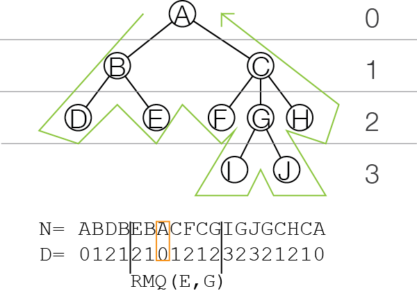 Reduktion von LCA auf RMQ